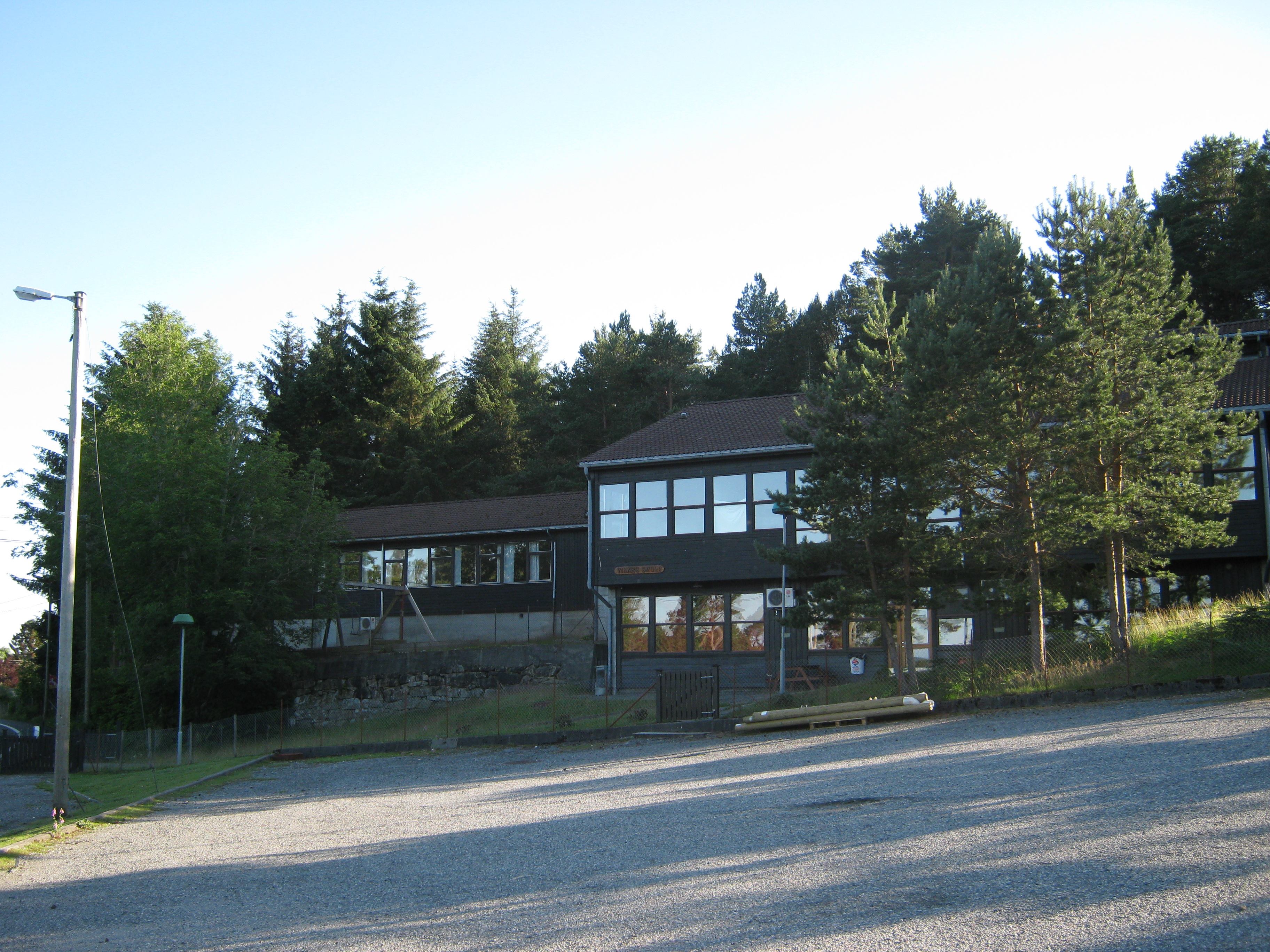 Vinnes skule på Austevoll (nedlagt 2009)